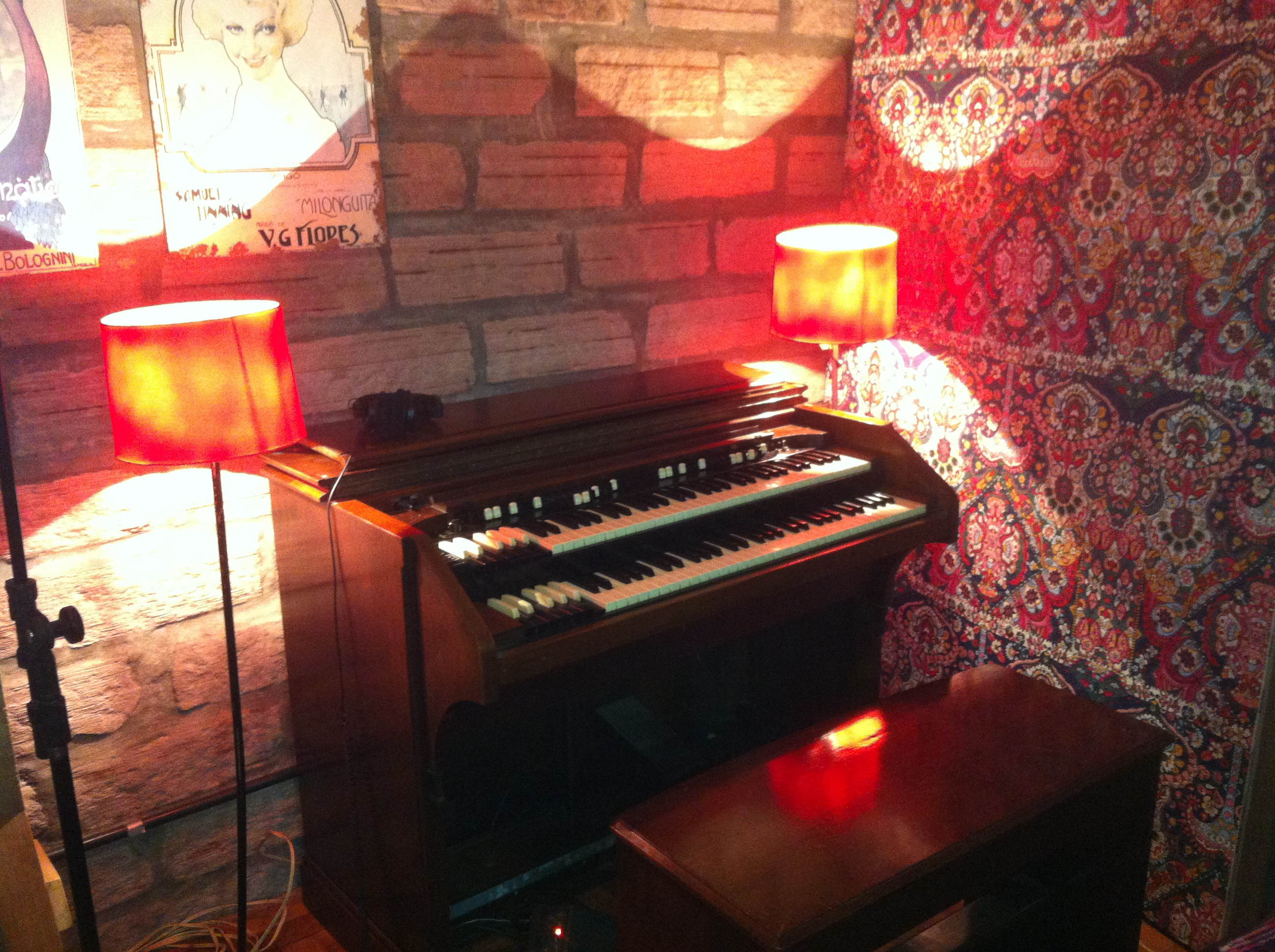 Orgão Hammond CV no Estúdio IAPI em Porto Alegre. Instrumento manufaturado em 1945.